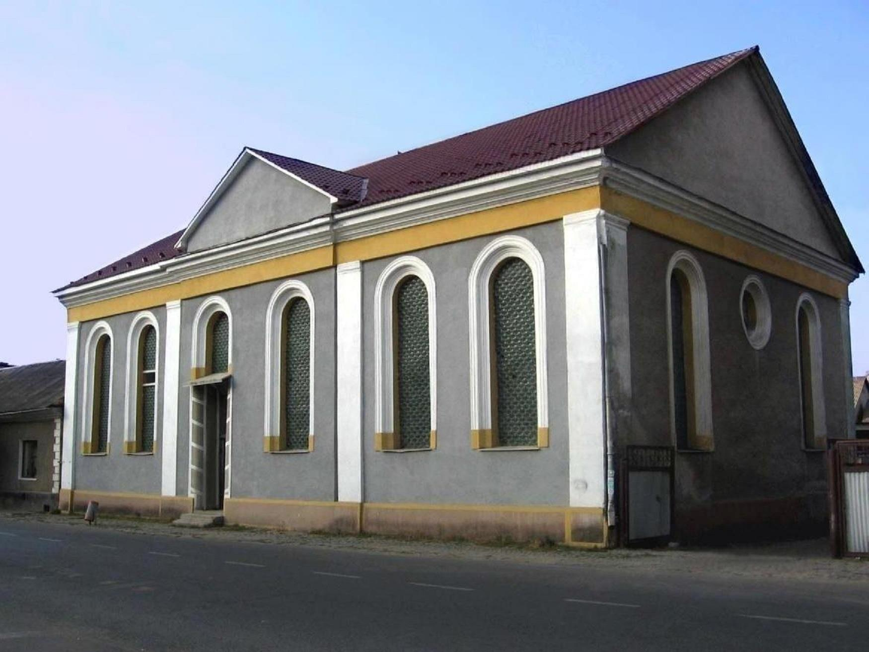 Бывшая синагога в Тячеве, теперь спортзал